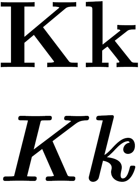 Latin letter K